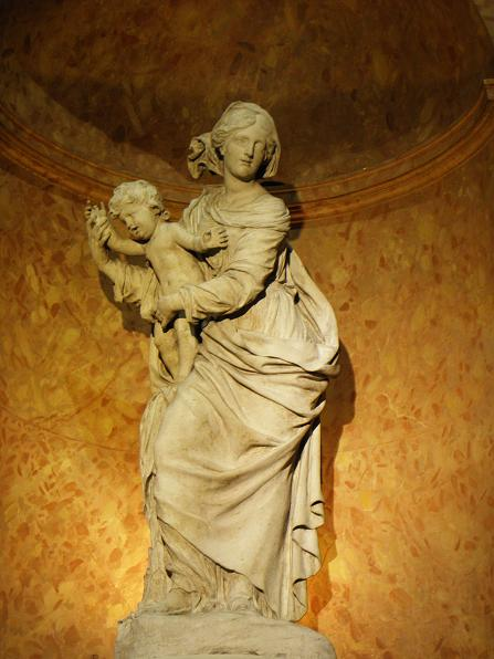 Vierge d'Antoine Coysevox en l'église St-Nizier de Lyon